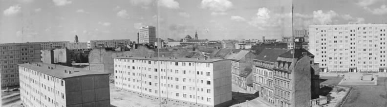 Berlin, Mollstraße Neubauten, Plattenbauten Zentralbild Spremberg 16.8.1965 Berlin wird schöner Unser Panorama zeigt einen Blick von der Mollstraße Ecke Landwehrstraße auf die Neubauten hinter der Karl-Marx-Allee. Im Zuge des Neuaufbaus des Stadtzentrums werden die alten Häuser, die jetzt auch den Gegensatz zwischen alt und neu demonstrieren, der großzügigen Stadtplanung weichen müssen. Information added by Wikimedia users. Der Elfgeschosser rechts ist das Haus Mollstraße 5-7, Plattenbautyp QP-61. Der Achtgeschosser links ist das Haus Berolinastraße 15-17, Plattenbautyp QP-64. Die Häuser in der Mitte, Typ Q3A, stehen in der Park-ähnlichen Anlage zwischen Berolina- und Mollstraße. Der Verlauf der Mollstraße befindet sich nicht sichtbar rechts vom Bild. Die Landwehrstraße (mit den Altbauten) ist komplett verschwunden, ihr Verlauf heute nicht mehr nachvollziehbar (hier befindet sich heute der Fröbel-Kindergarten Berolina- Ecke Mollstraße). Sie mündete ungefähr dort, wo sich heute der Parkplatz Berolinastraße hinter dem Haus der Statistik befindet.